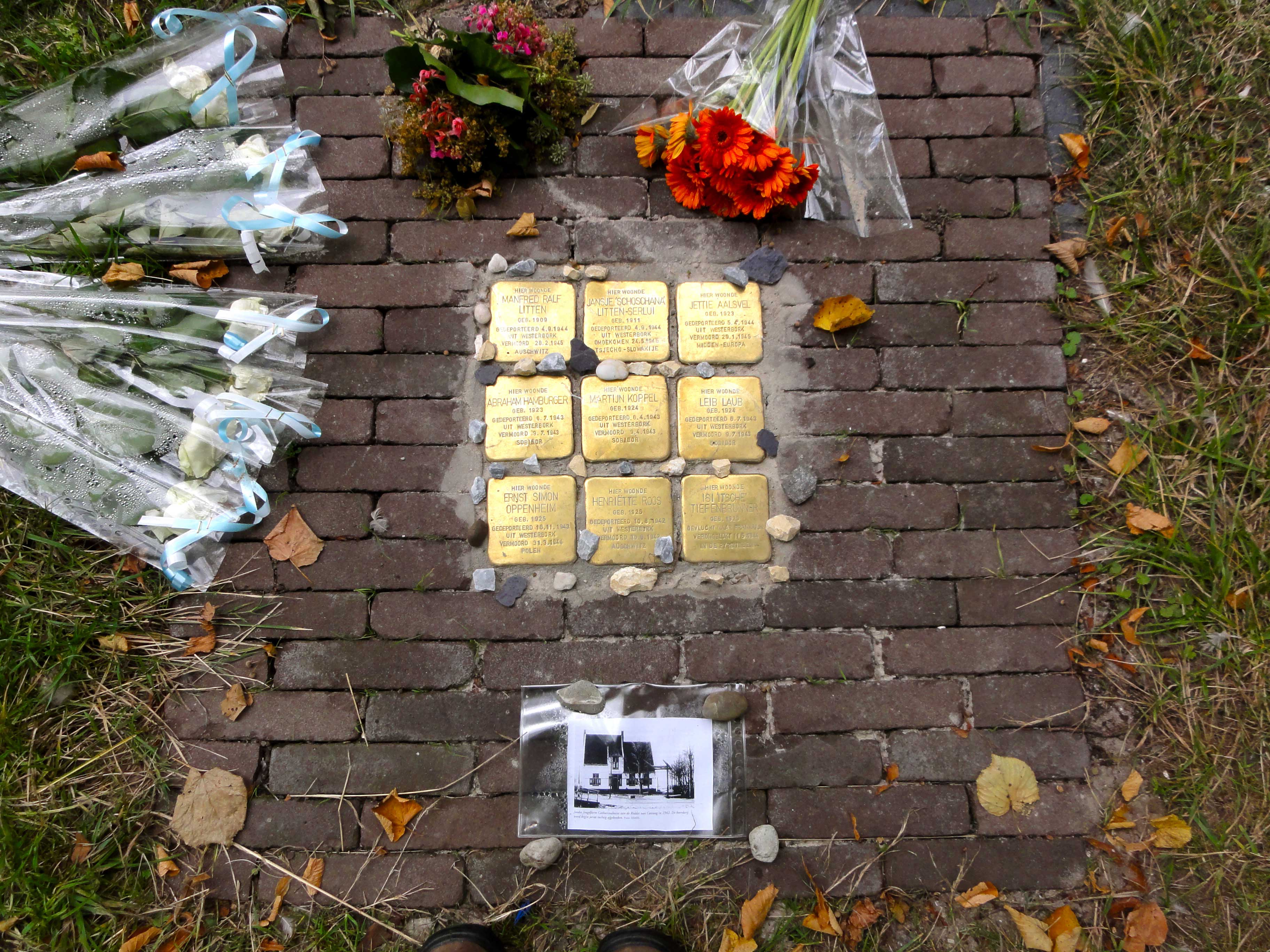 Stolpersteine - Ridder van Catsweg 61 (Jeugdfarm Catharinahoeve) - Manfred Ralf Litten, Jansje (Schoschana) Litten-Serlui, Jettie Aalsvel, Abraham Hamburger, Martijn Koppel, Leib Laub, Ernst Simon Oppenheim, Henriëtte Roos, Isi (Itsche) Tiefenbrunner